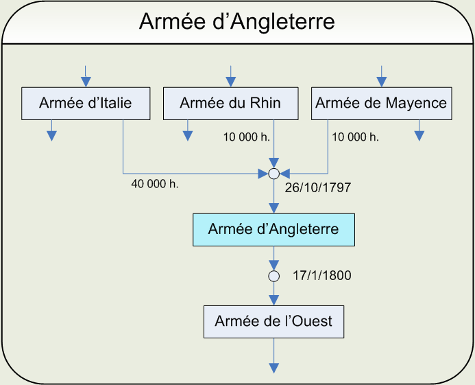 Ordinogramme de l'armée d'Angleterre Dessin réalisé par Papier K